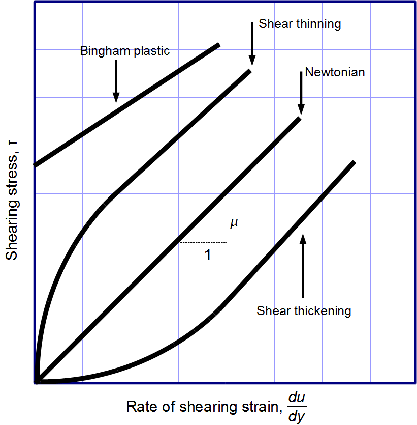 Made it myself